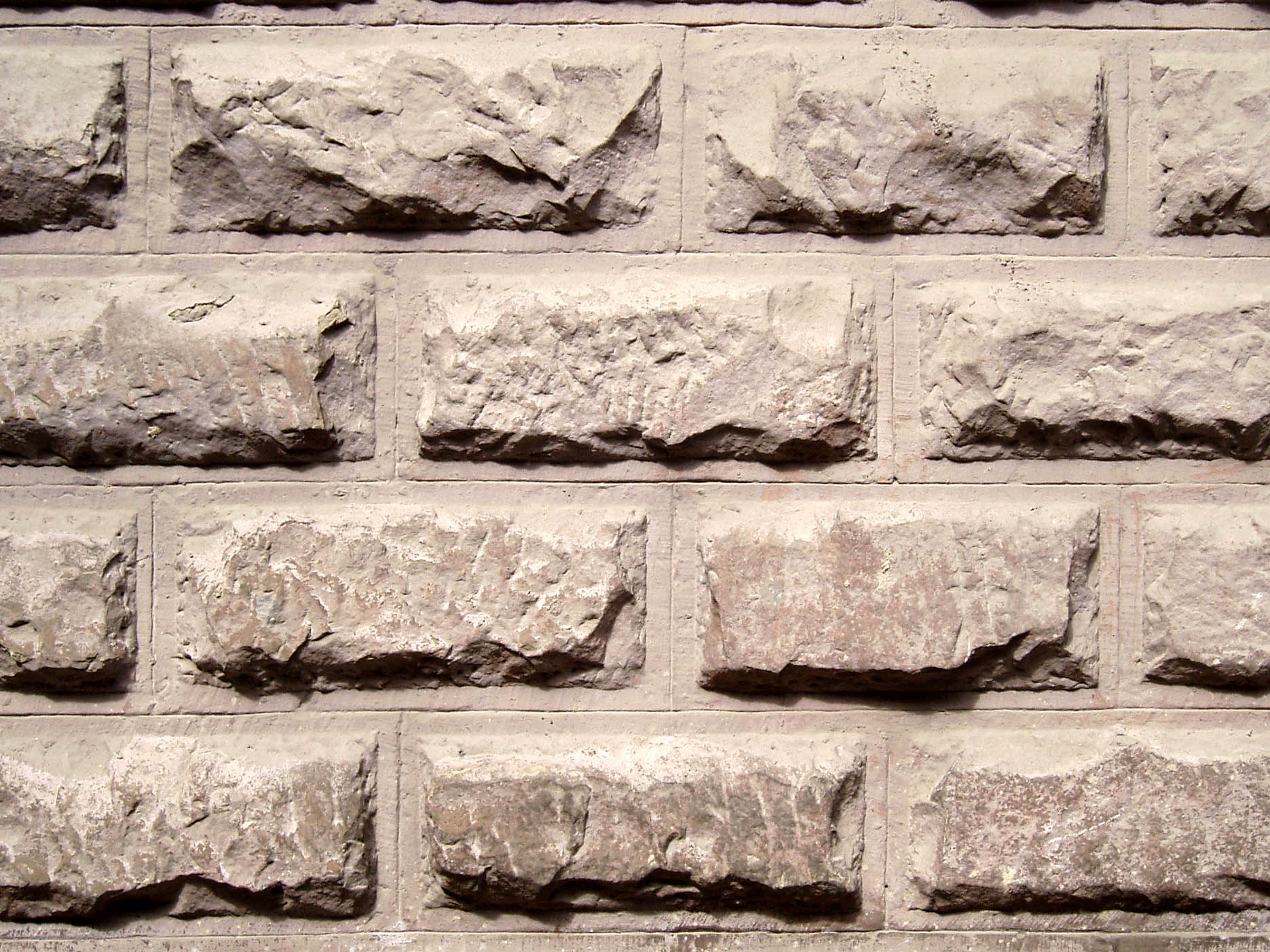 Будинок № 14 на вулиці Глибокій у Львові